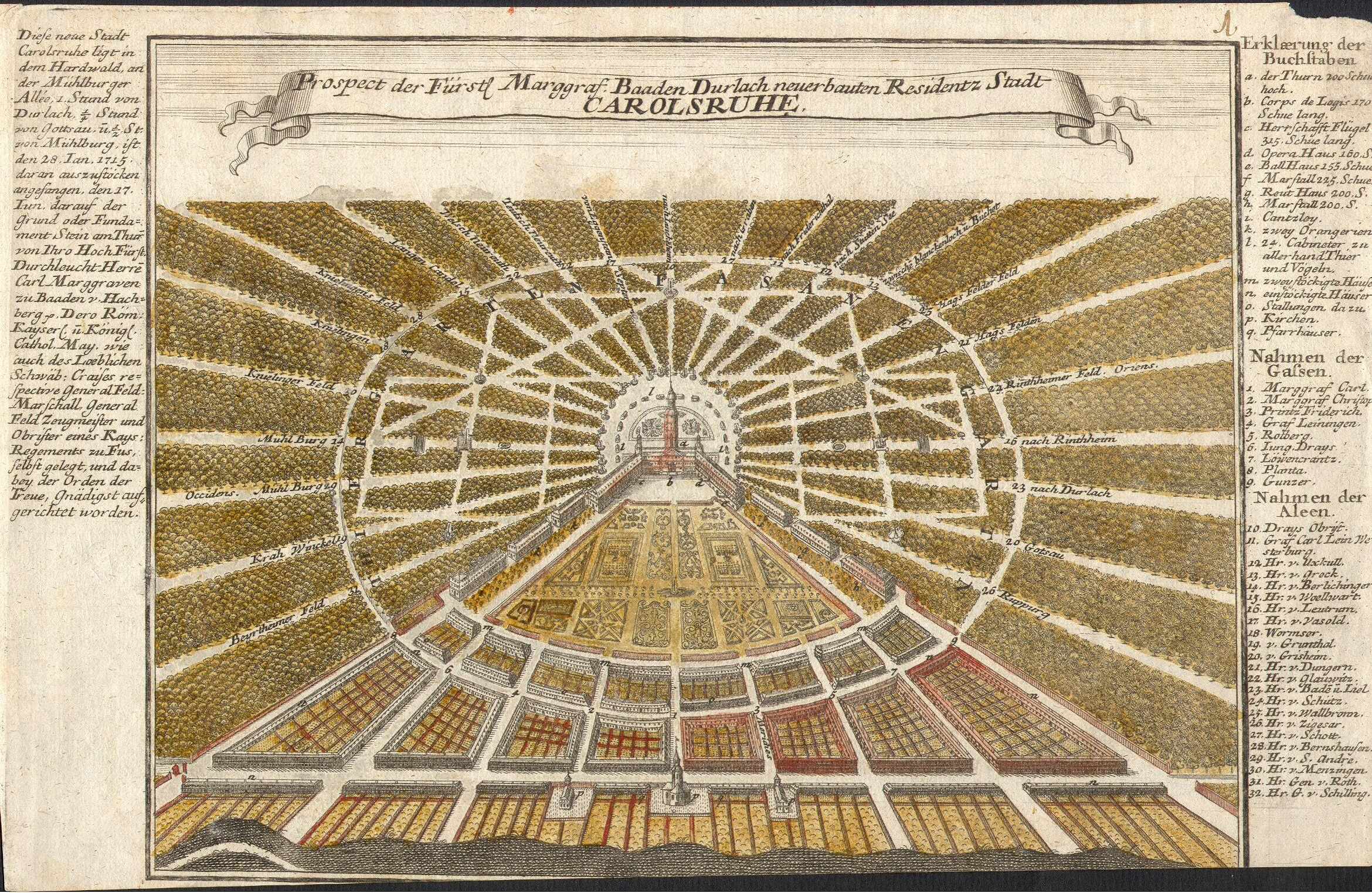 Prospect der Fürstl. Marggraf Baden Durlach neu erbauten Residentz Stadt Carolsruhe. Kupferstich, koloriert.